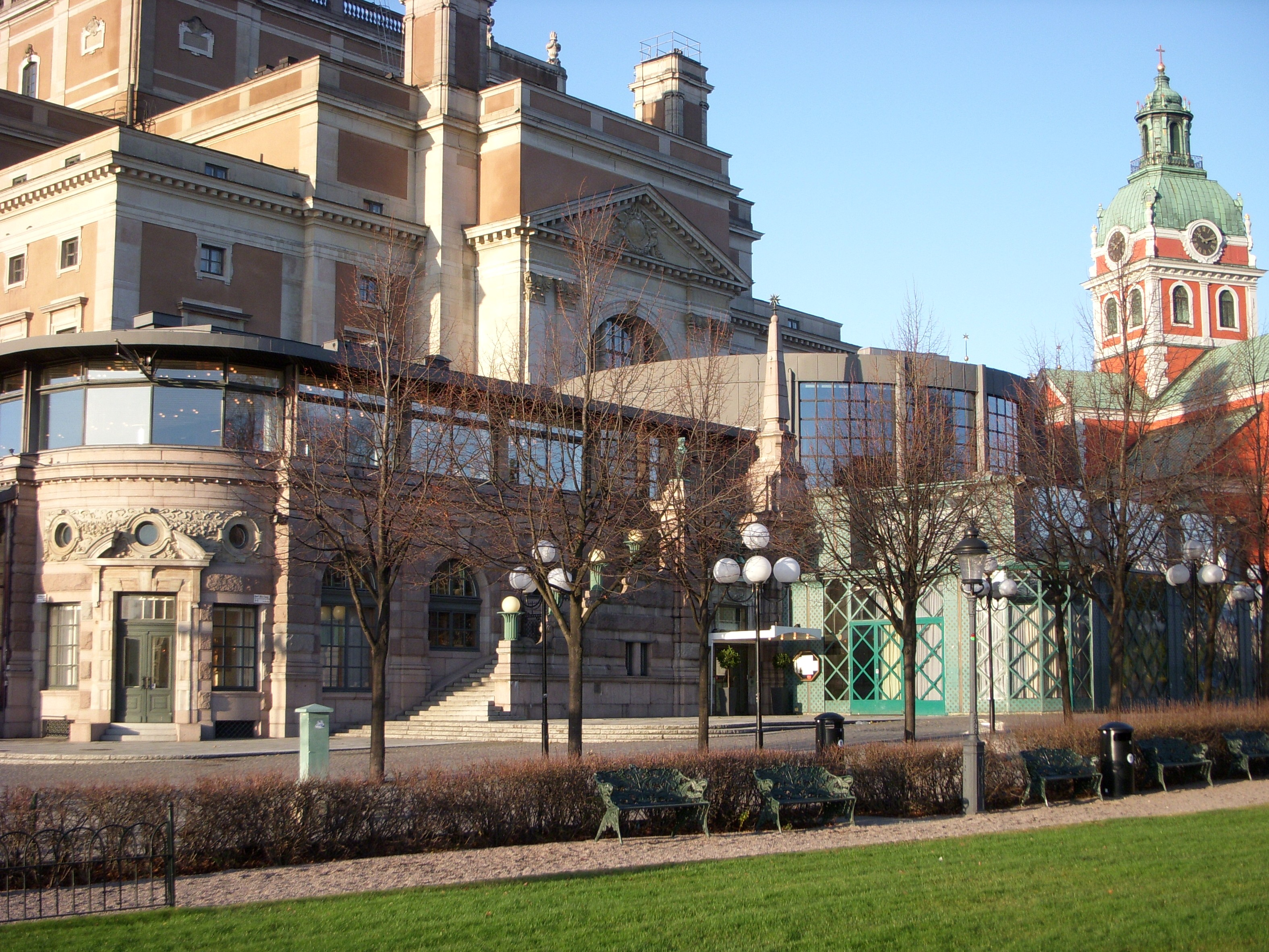 Operakällaren i Stockholm